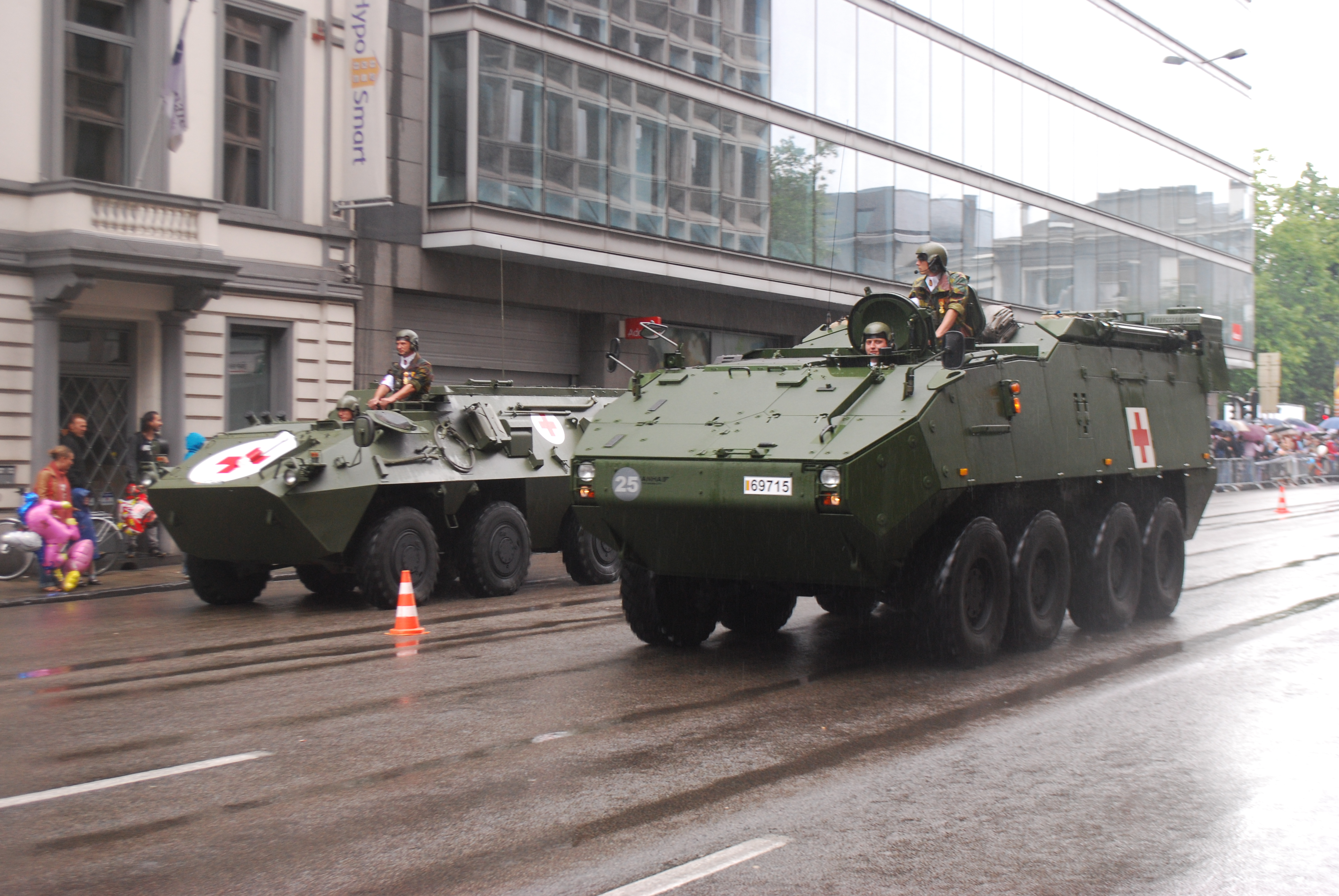 Dispersion des véhicules du défilé de la Fête nationale belge à Bruxelles, le 21 juillet 2011.